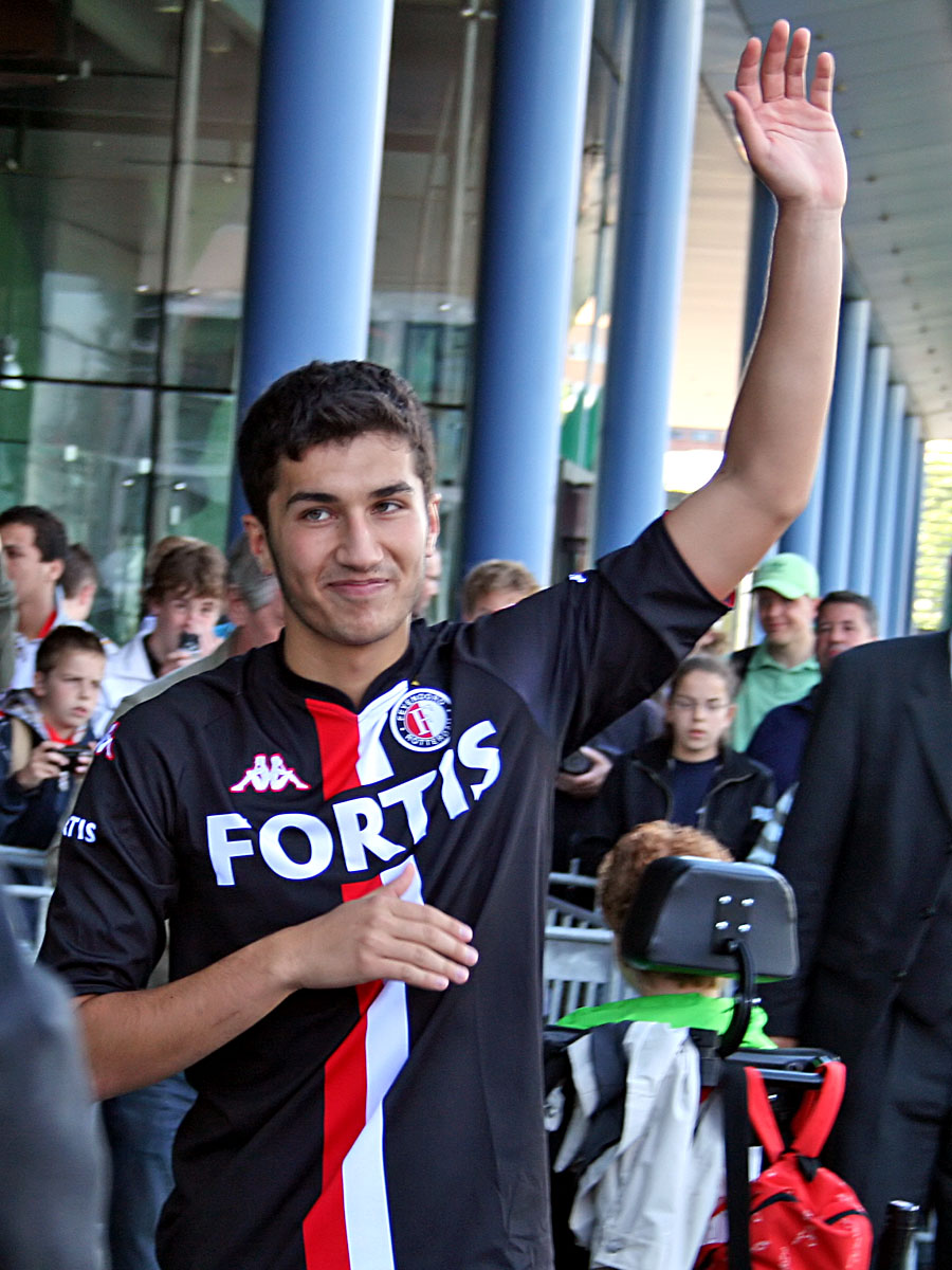 Nuri Sahin (Feyenoord)